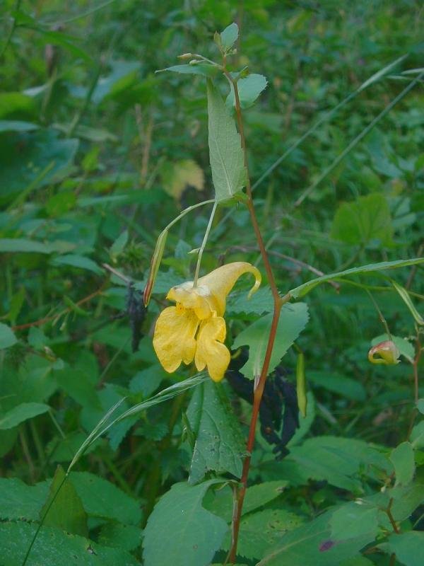 Impatiens noli-tangere, Balsamine des bois, Luchon